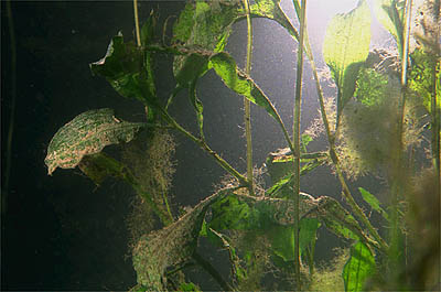 (Waarschijnlijk) glanzig fontijnkruid